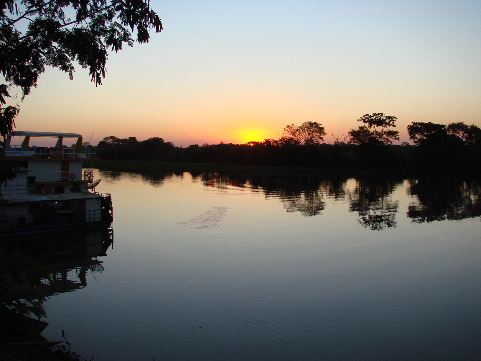 Rio Paraguai passando pelo centro da cidade de Cáceres-MT